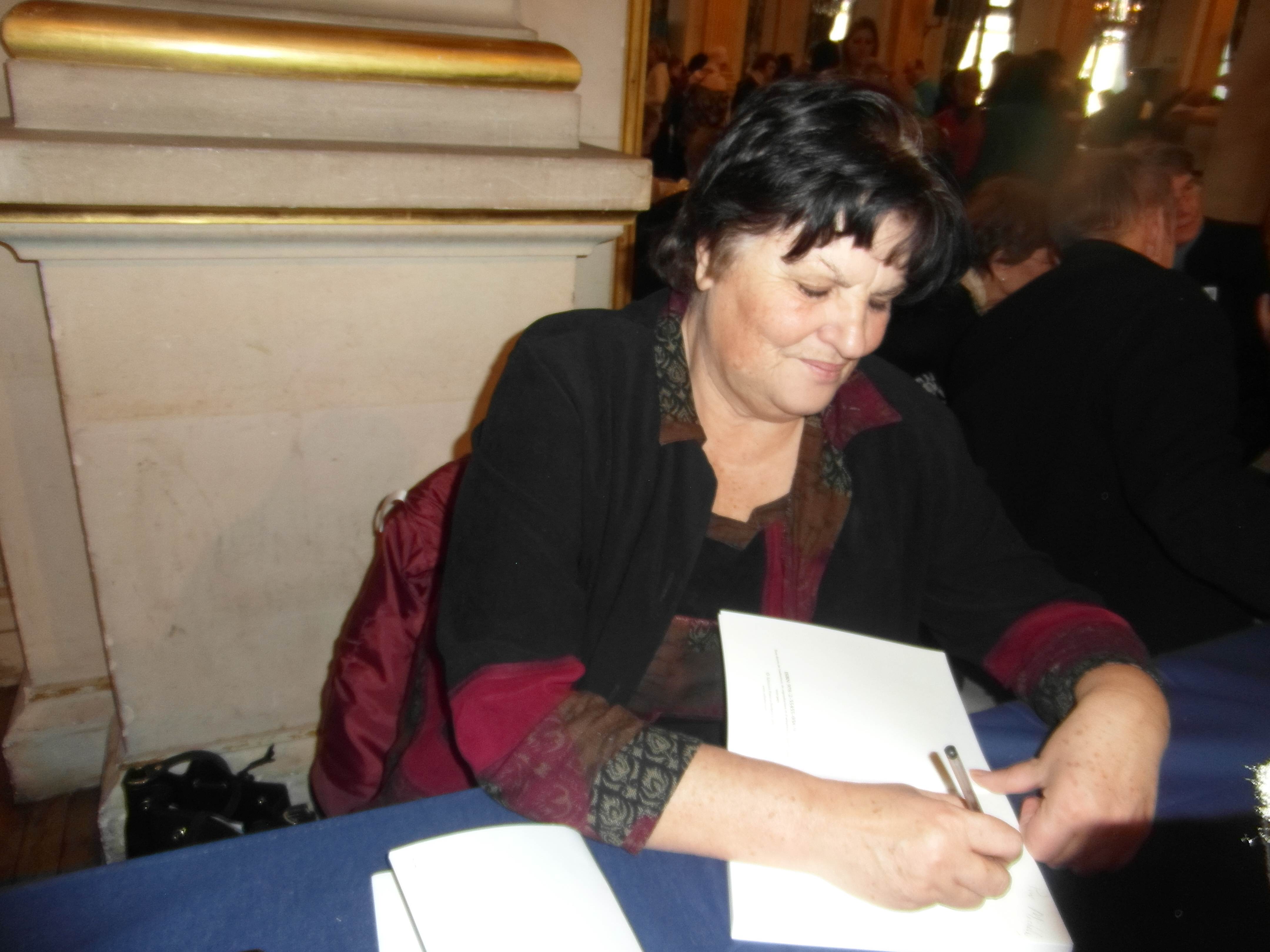 Maghreb des Livres, 7 et 8 février 2015